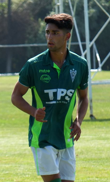 Fotografía de Gonzalo Candia, jugador profesional chileno, jugando por las divisiones inferiores del Santiago Wanderers.